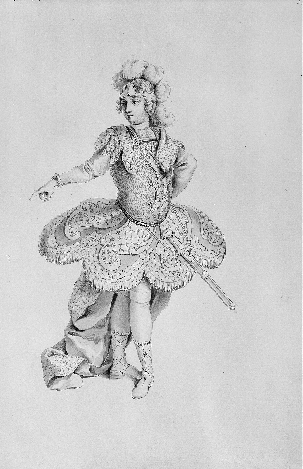 Domenico Annibali als Attilio Regolo in der Oper "Attilio Regolo" von Johann Adolph Hasse. Hoftheater Dresden, Uraufführung 12. Januar 1750. Federzeichnung von Francesco Ponte In: Vestiarium der Oper "Attilio Regolo". Dresden: Kupferstich-Kabinett Ca 103 Blatt 5